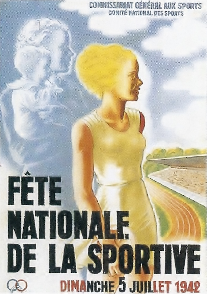 Affiche de propagande du gouvernement de Vichy (1942, Fête nationale de la sportive)